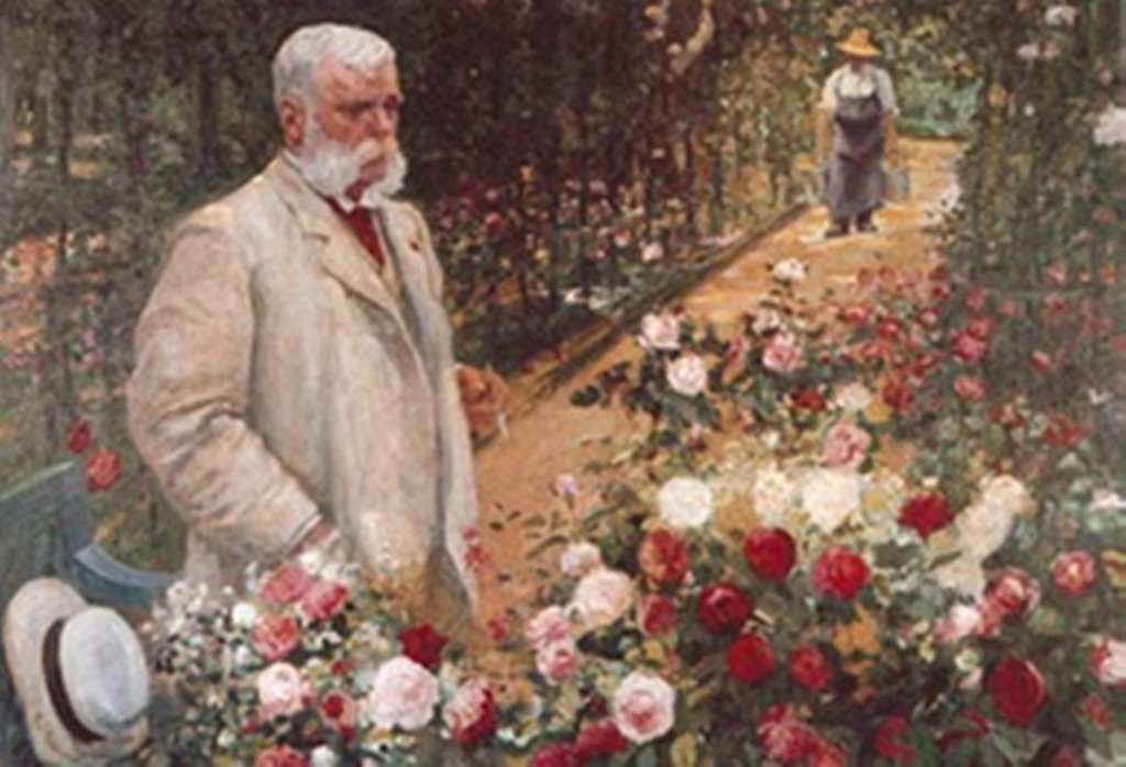 Jules Gravereaux dans sa roseraie